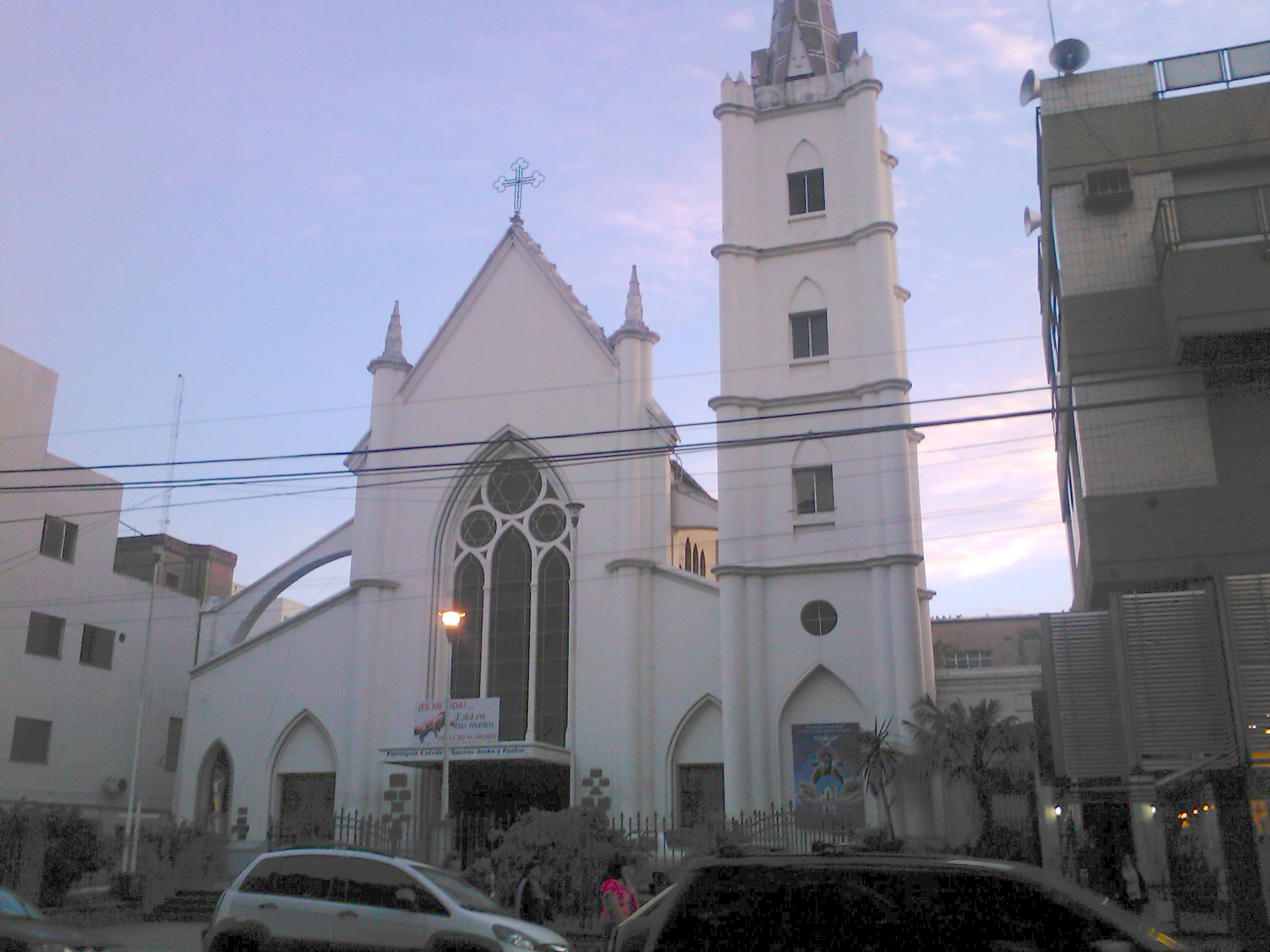 Catedral de los Santos Justo y Pastor. Dr. Ignacio Arieta 3045, San Justo, Prov. de Buenos Aires.